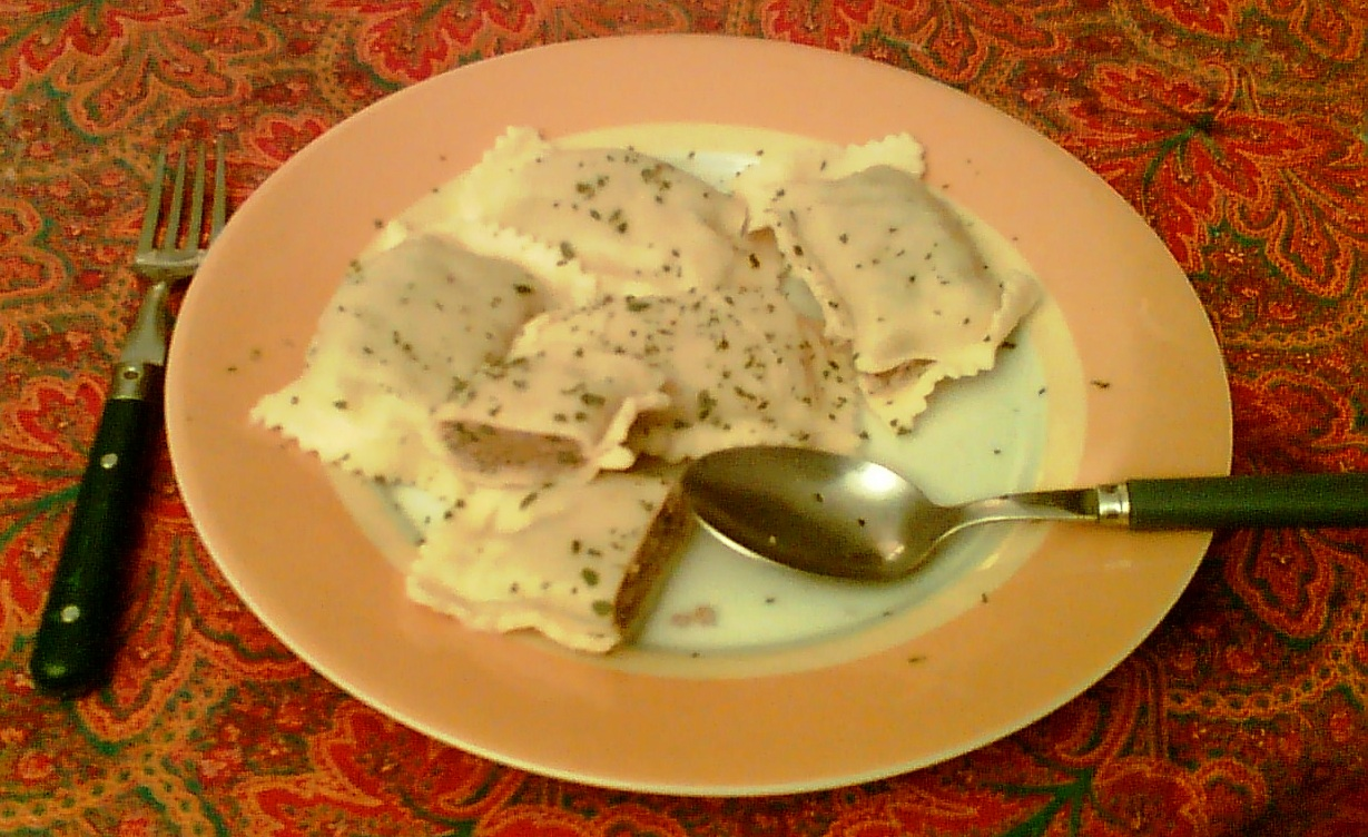 Maultaschen